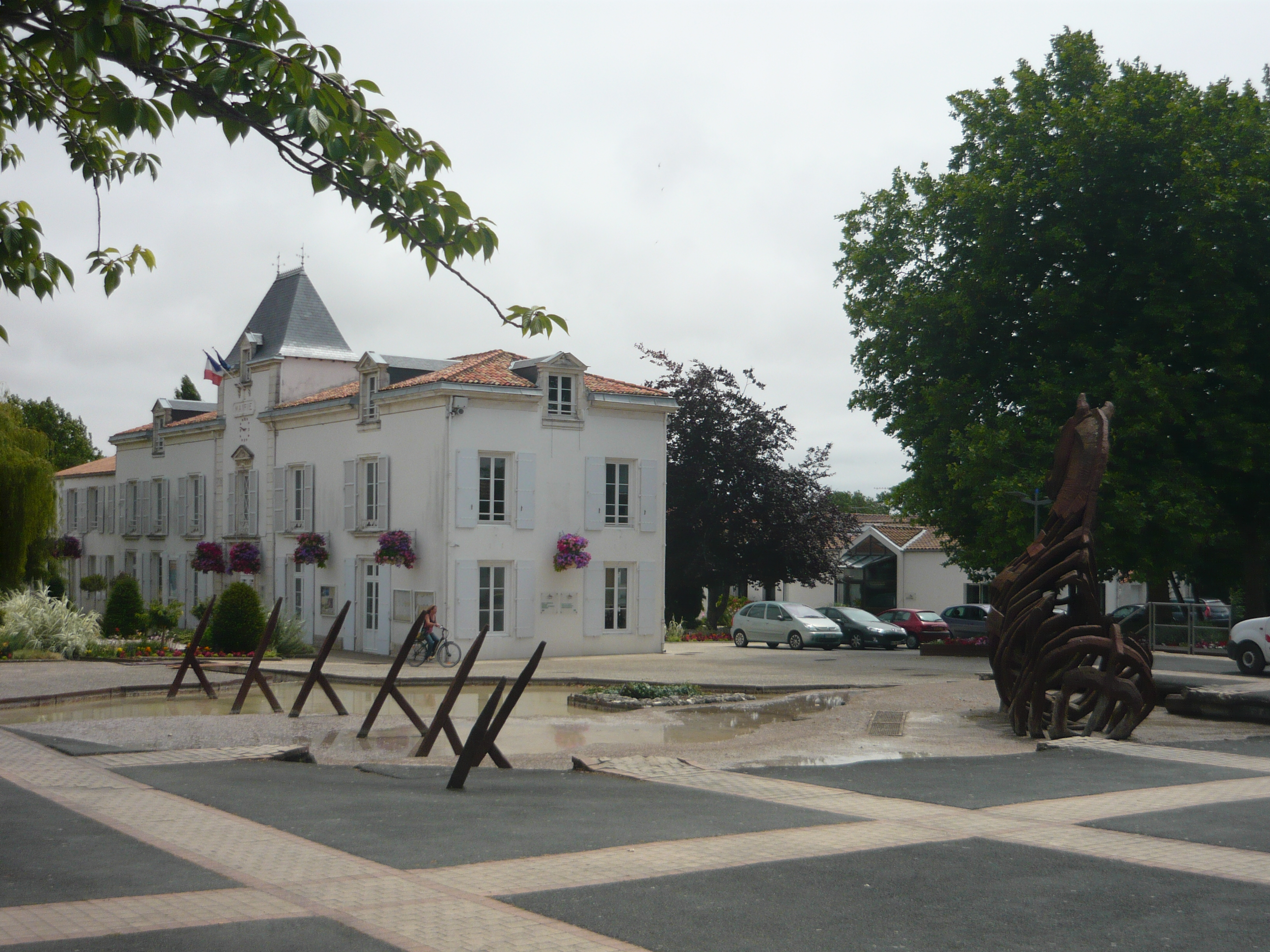 Vue d'ensemble du parc de l'hôtel de ville d'Aytré